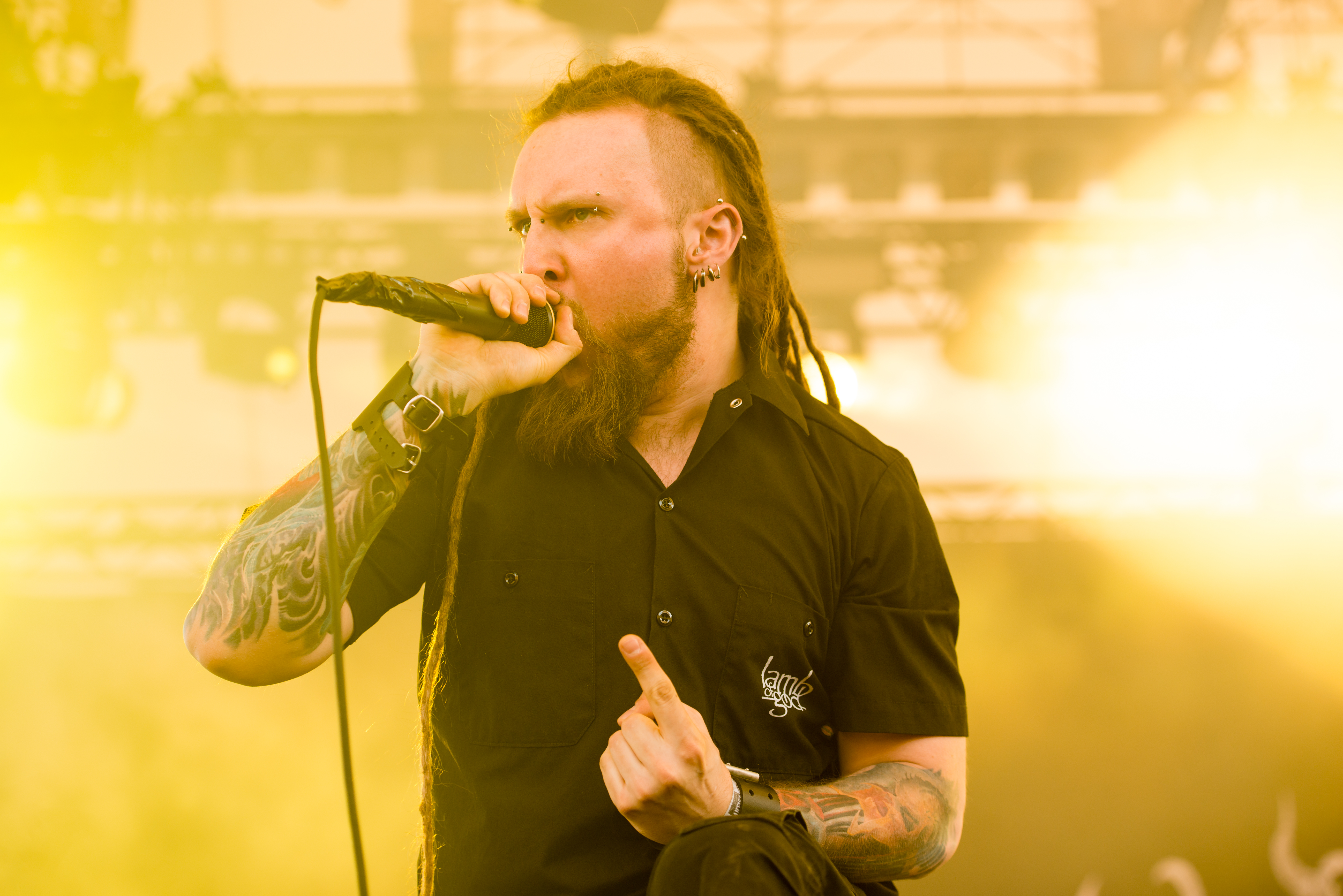 'Rock Hard Festival 2014 - Gelsenkirchen': 'Decapitated'